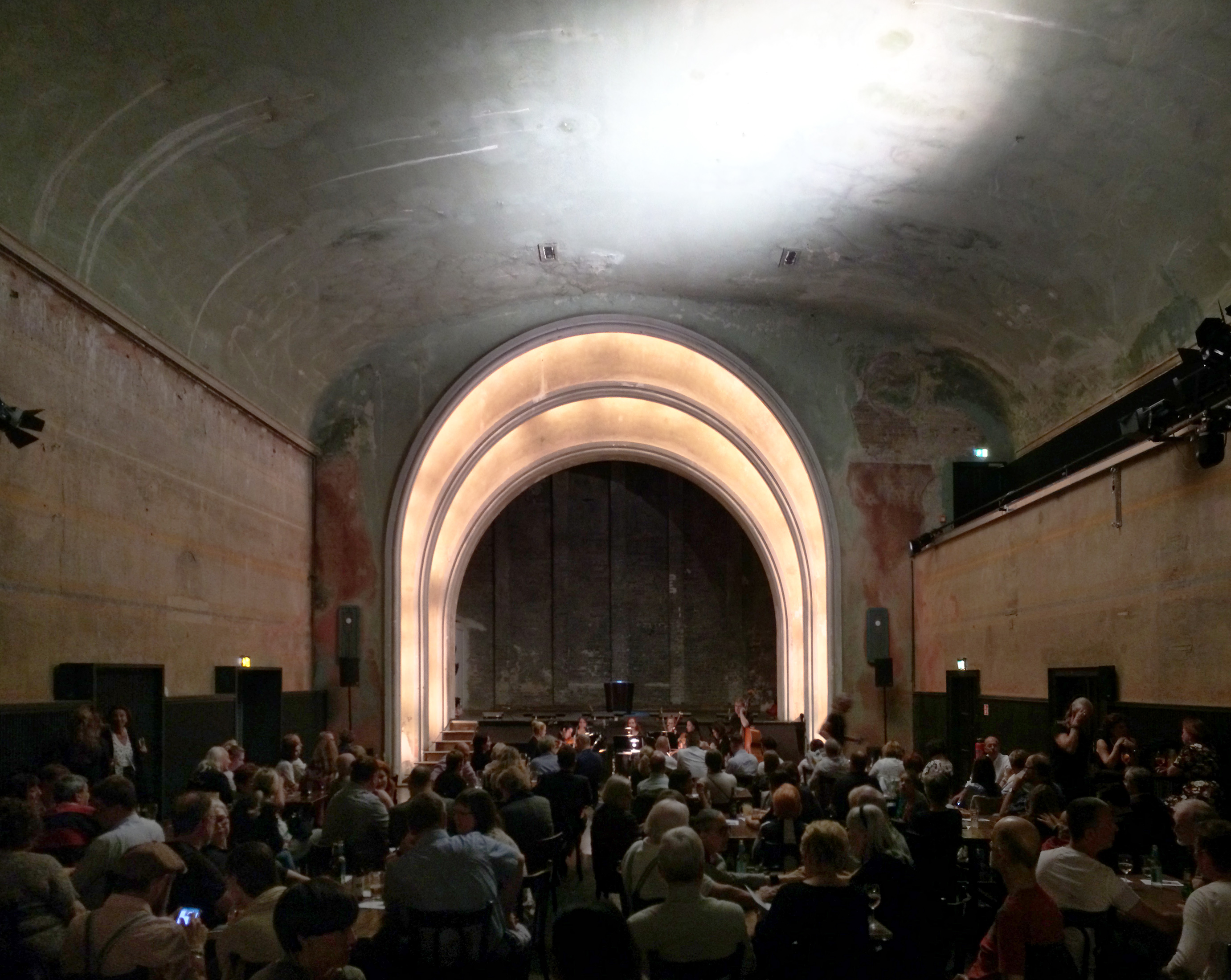 Ehemaliges Stummfilmkino Delphi, Gustav-Adolf-Straße, Berlin-Weißensee, 1929, Julius Krost, Heinrich Zindel, Umbau 2017, Silvia Carpaneto, Christian Schöningh